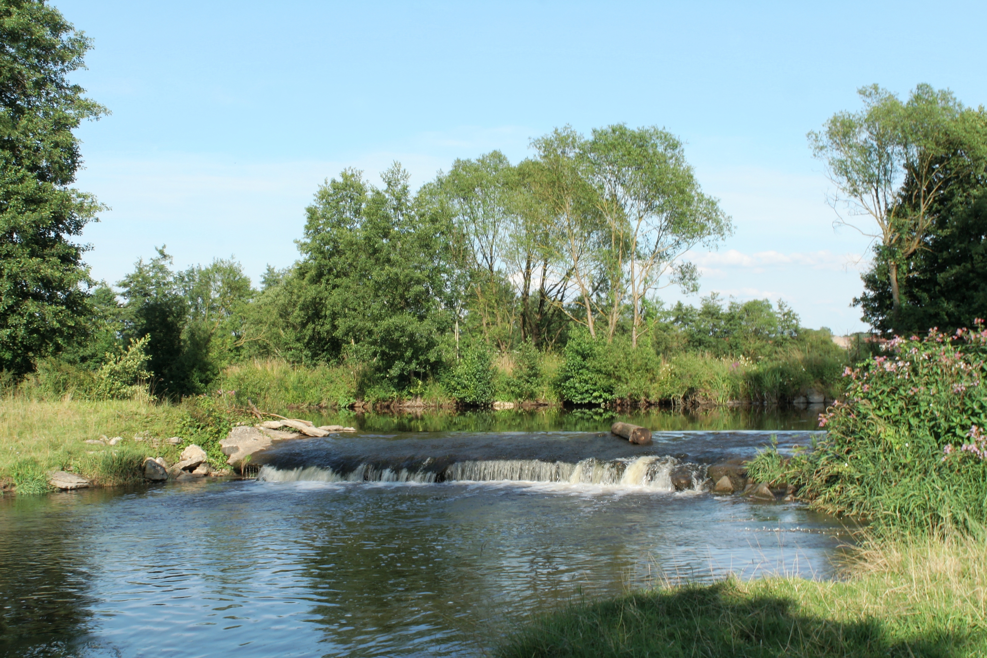 La Mortagne, à Magnières (Meurthr-rt-Moselle).